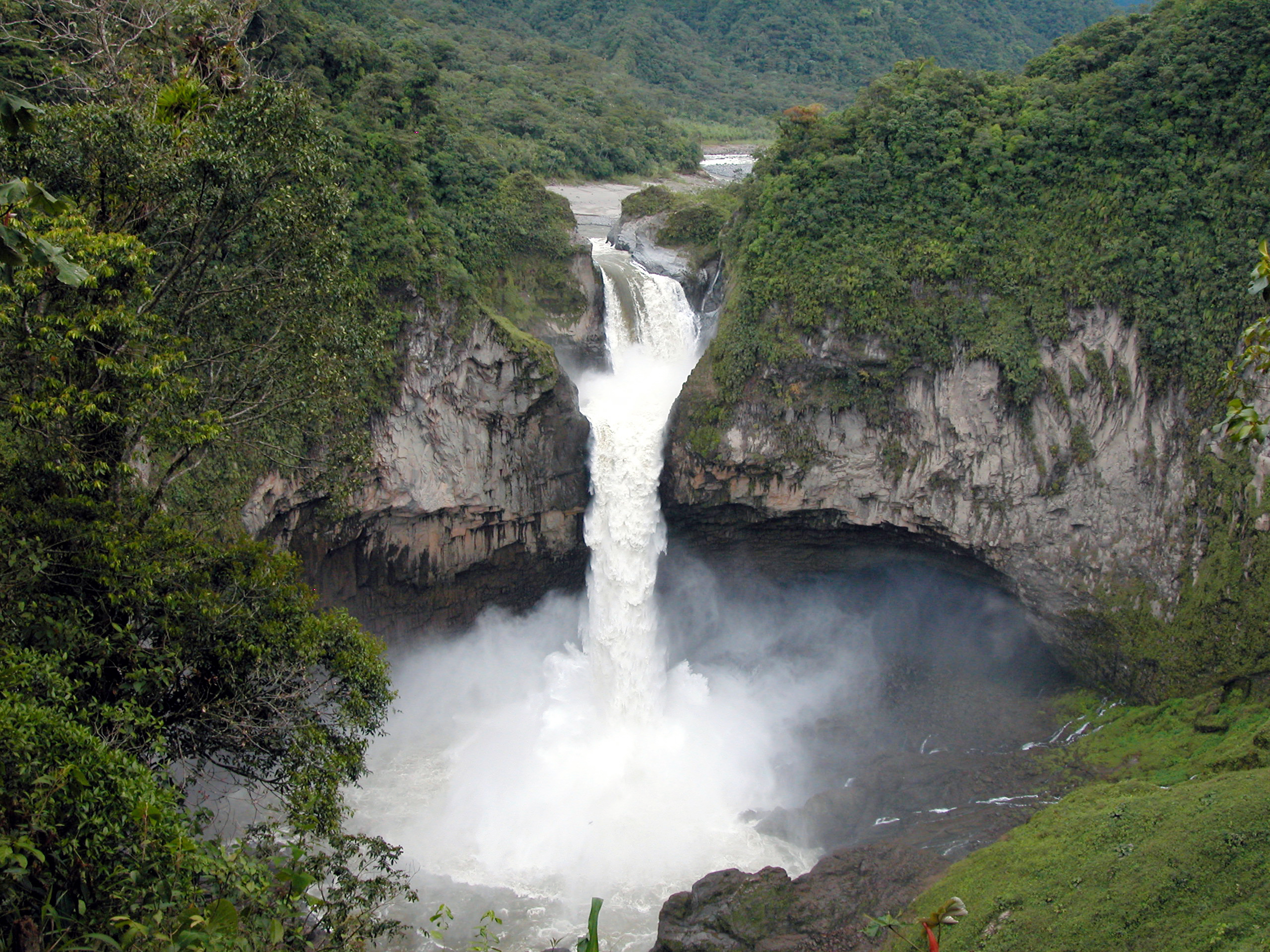 Cascada de San Rafael limite provincial de Napo y Sucumbíos